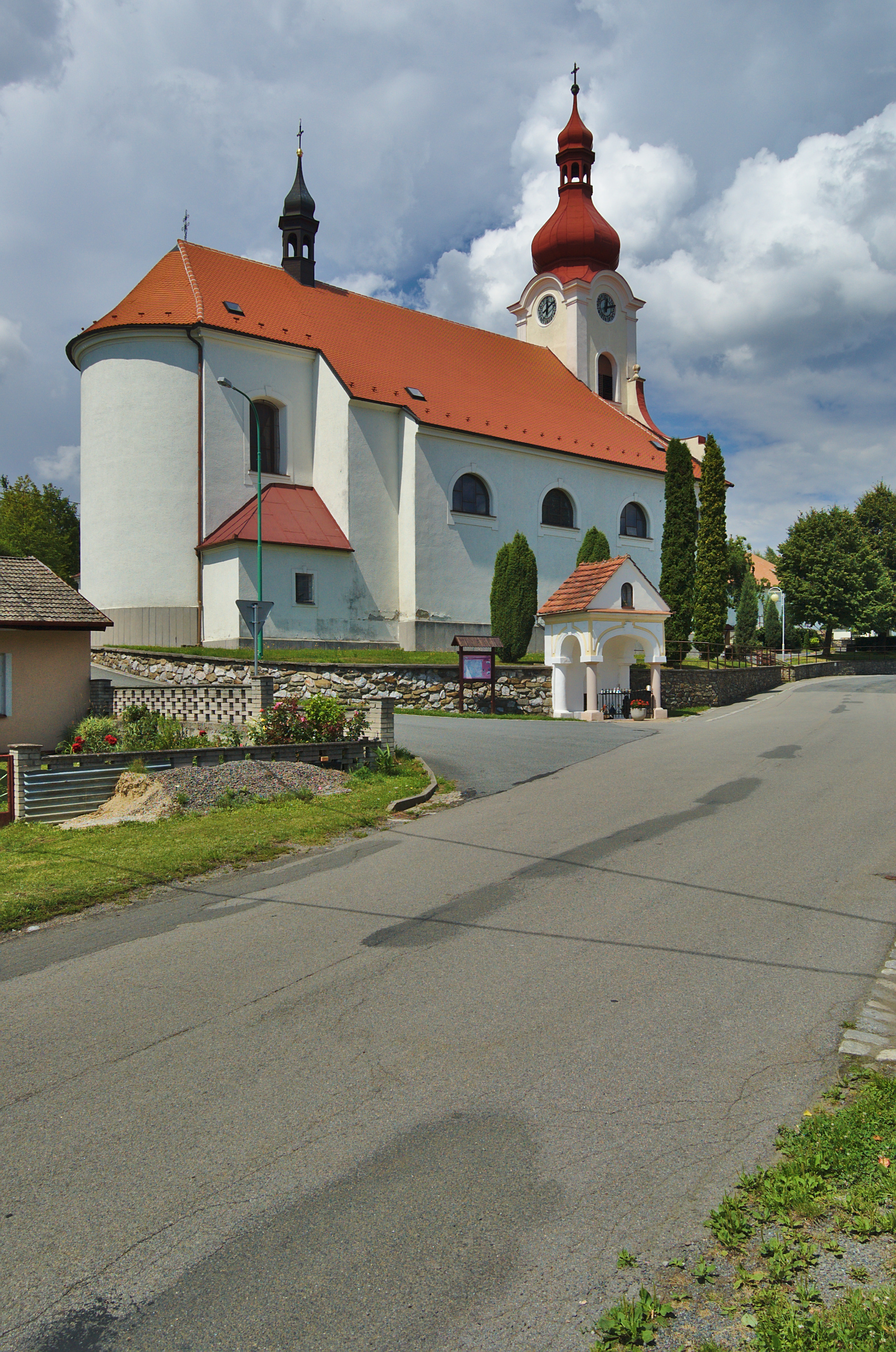 Kostel Navštívení Panny Marie, Jednov, Suchdol, okres Prostějov